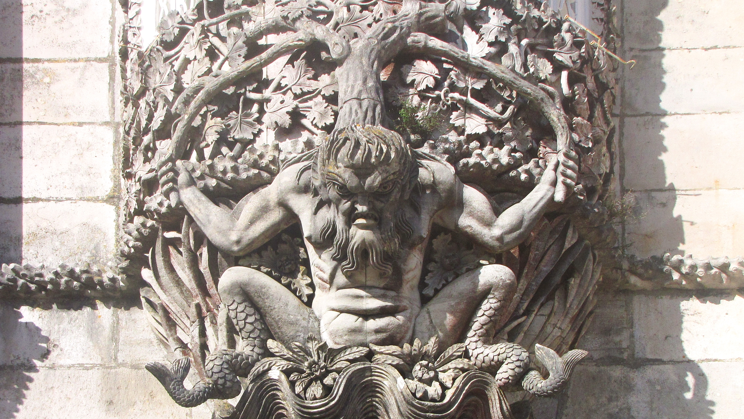 Triton manuelinische Torskulptur von D. Fernando als Schöpfungsallegorie für Pórtico do Tritão - Palácio Nacional da Pena Foto Wolfgang Pehlemann IMG_9596